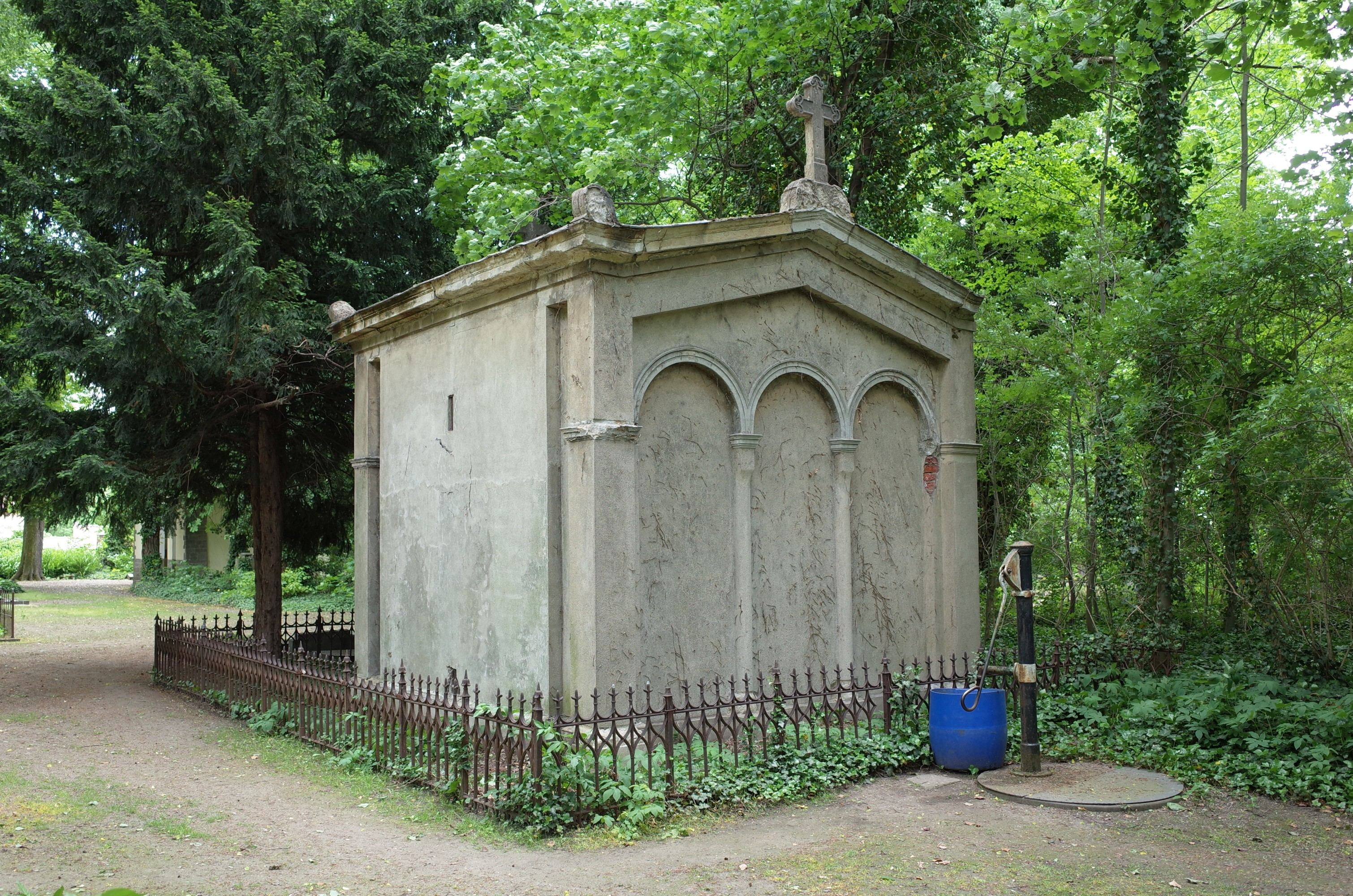 Kleinpaschleben, Mausoleum. Grablege Fam. Schröter, kleines tempelartiges Gebäude spätklassizistischen Stils mit flachem Satteldach, 1863 (Quelle:FLÄCHENNUTZUNGSPLAN DER GEMEINDE OSTERNIENBURGER LAND (Seite 258) [1])